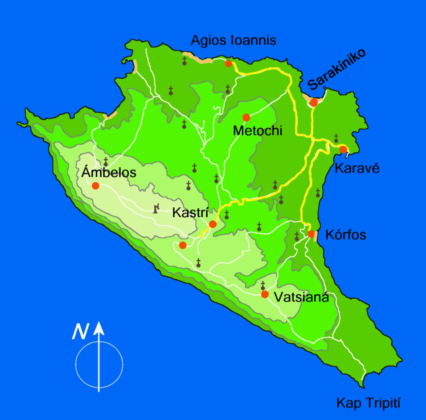 Karte von Gavdos